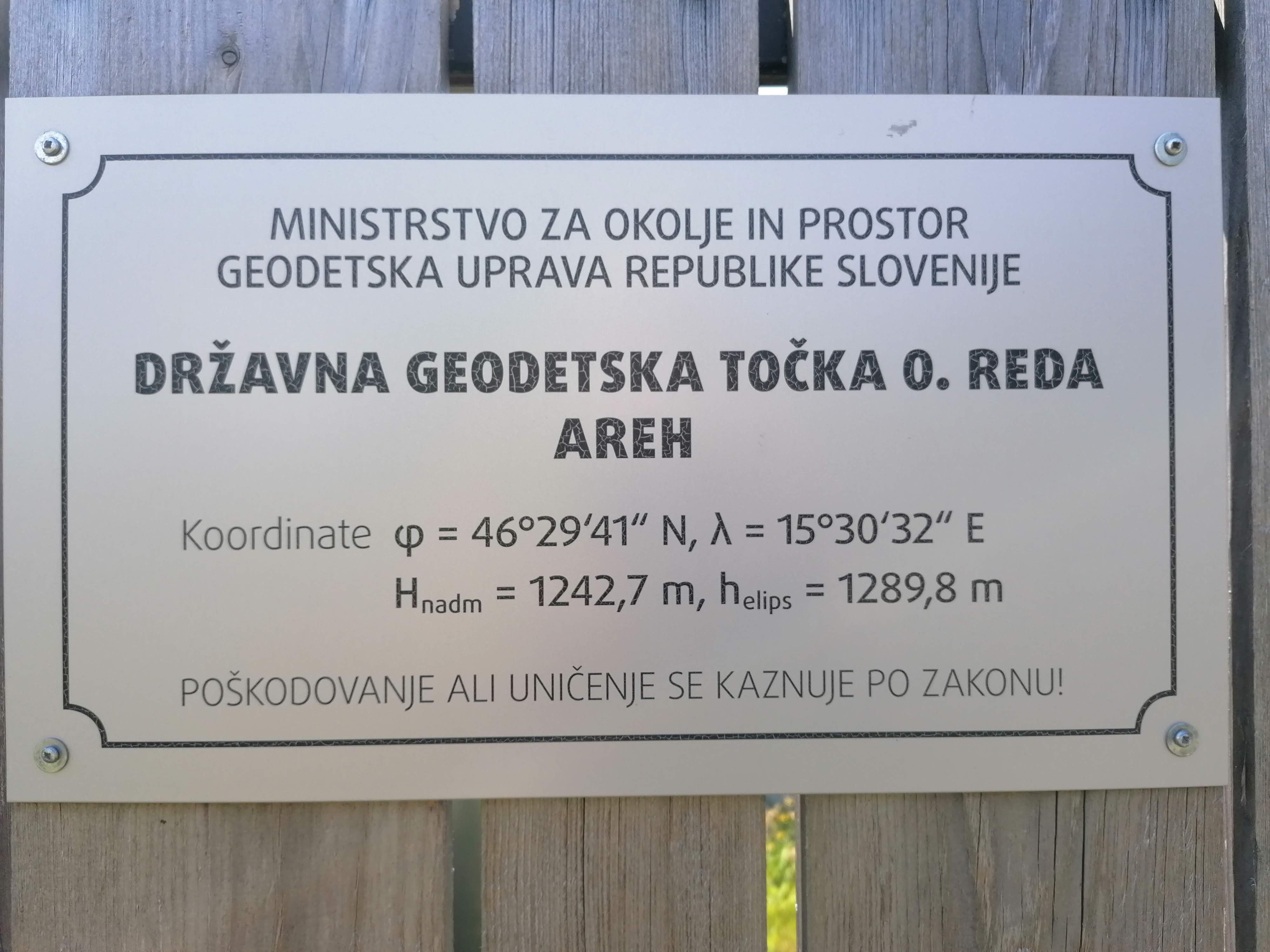 Areh - točka mreže 0. reda, napis